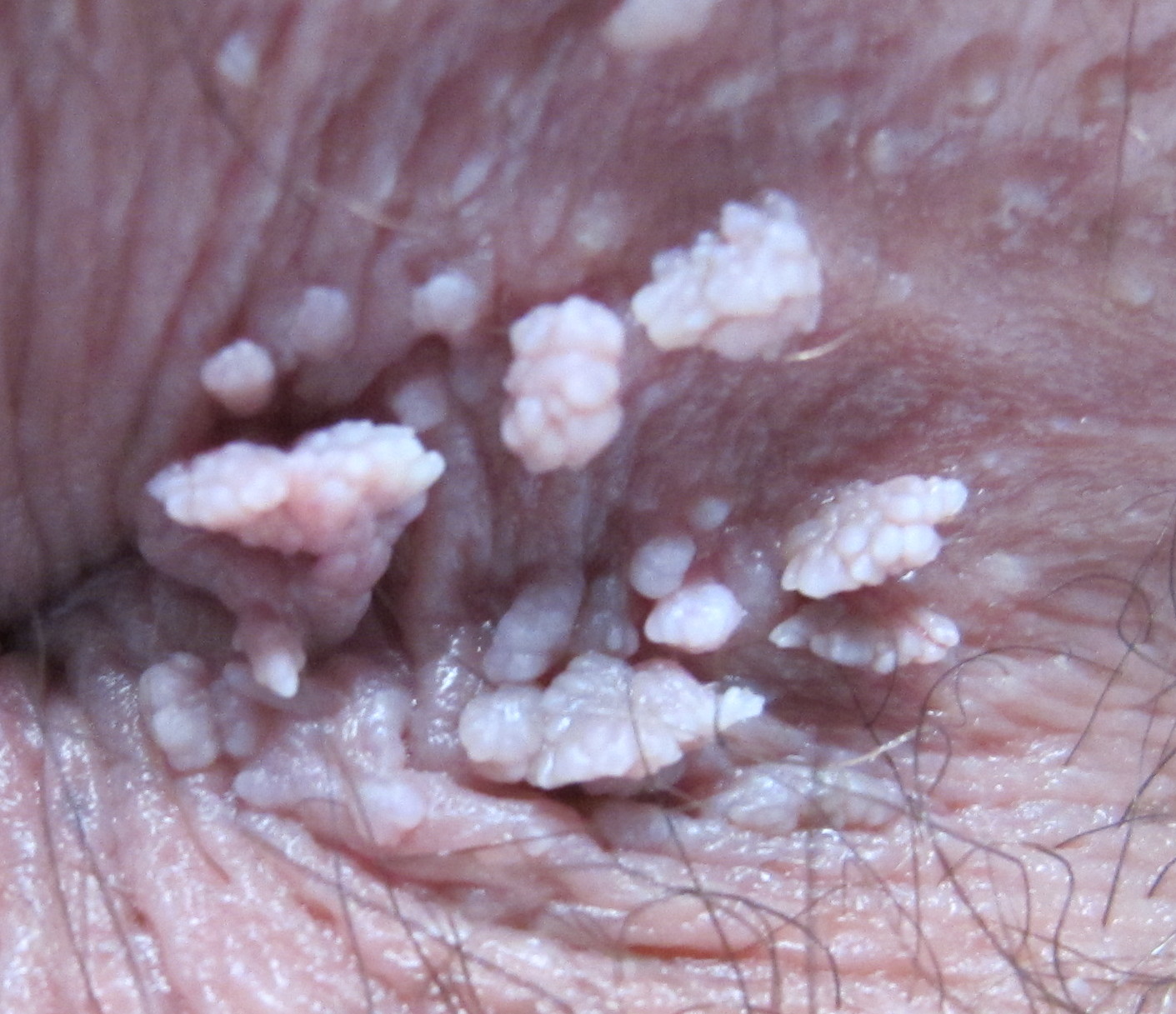 Κονδυλώματα πρωκτού